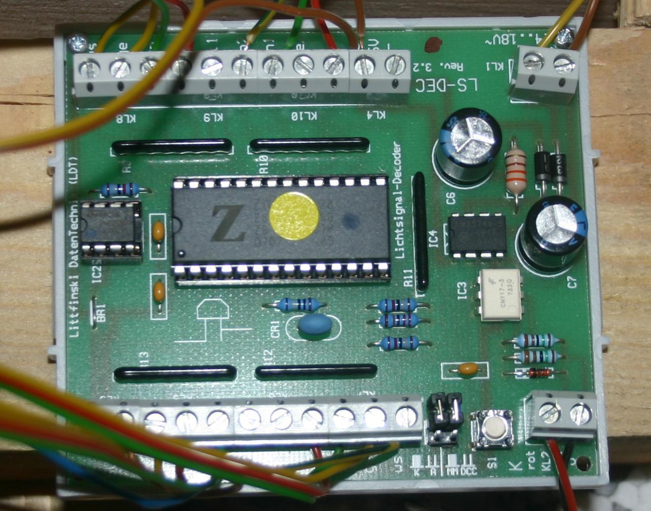 Interna eines Modellbahn-Signaldecoder der Firma Littfinski Datentechnik (LDT)